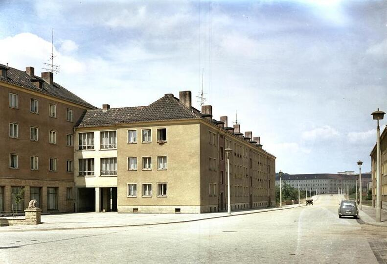 Gera-Bieblach, Wohnungsbau Wohnungsbau Gera-Bieblach [Gera-Bieblach.- Wohnungsbau]